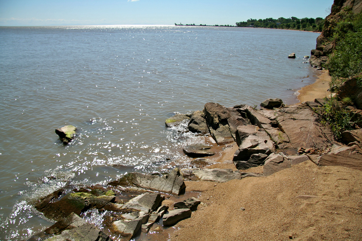 Ханка близ Камня-Рыболова.